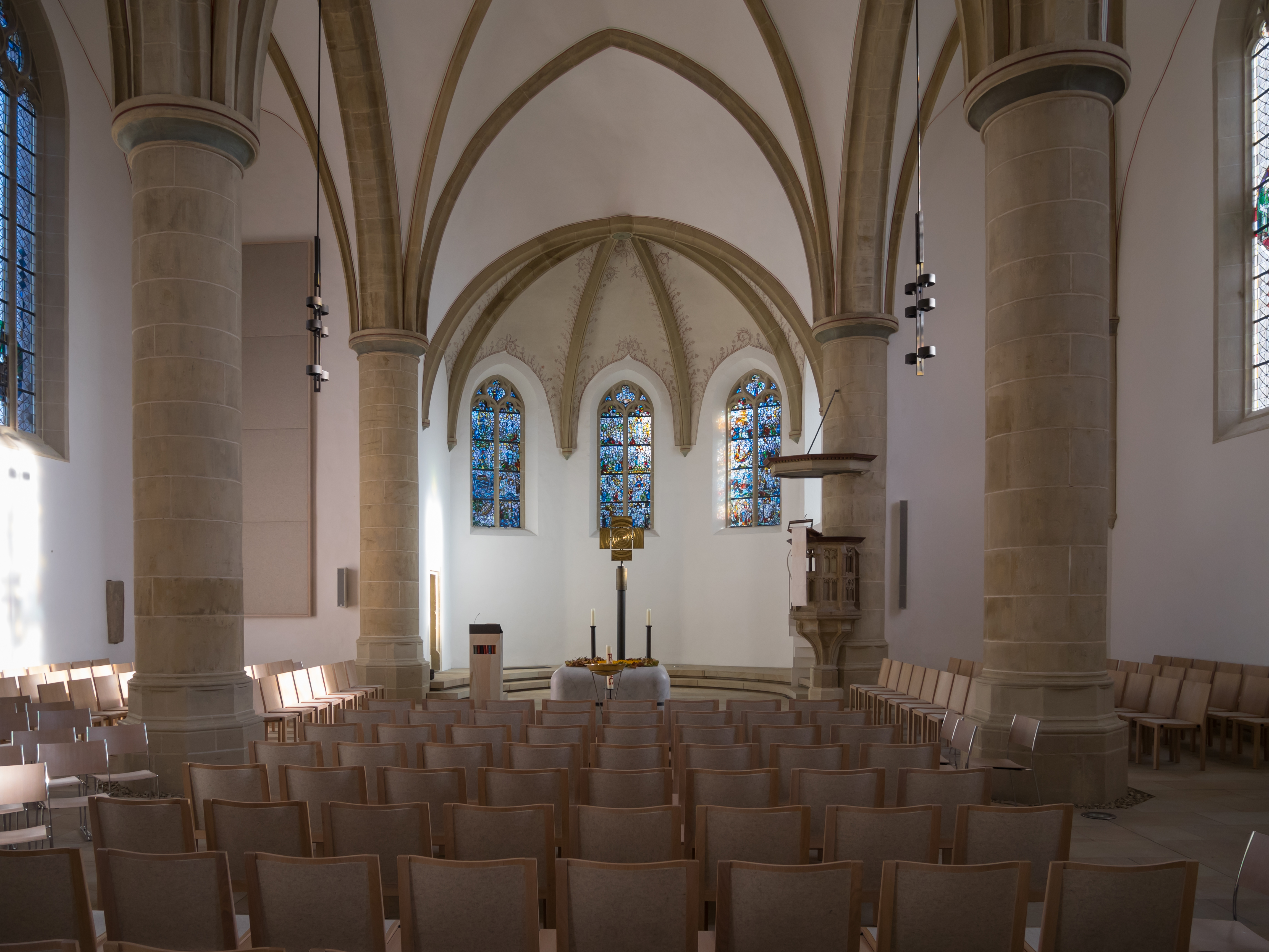 Innenansicht Christuskirche Ibbenbüren